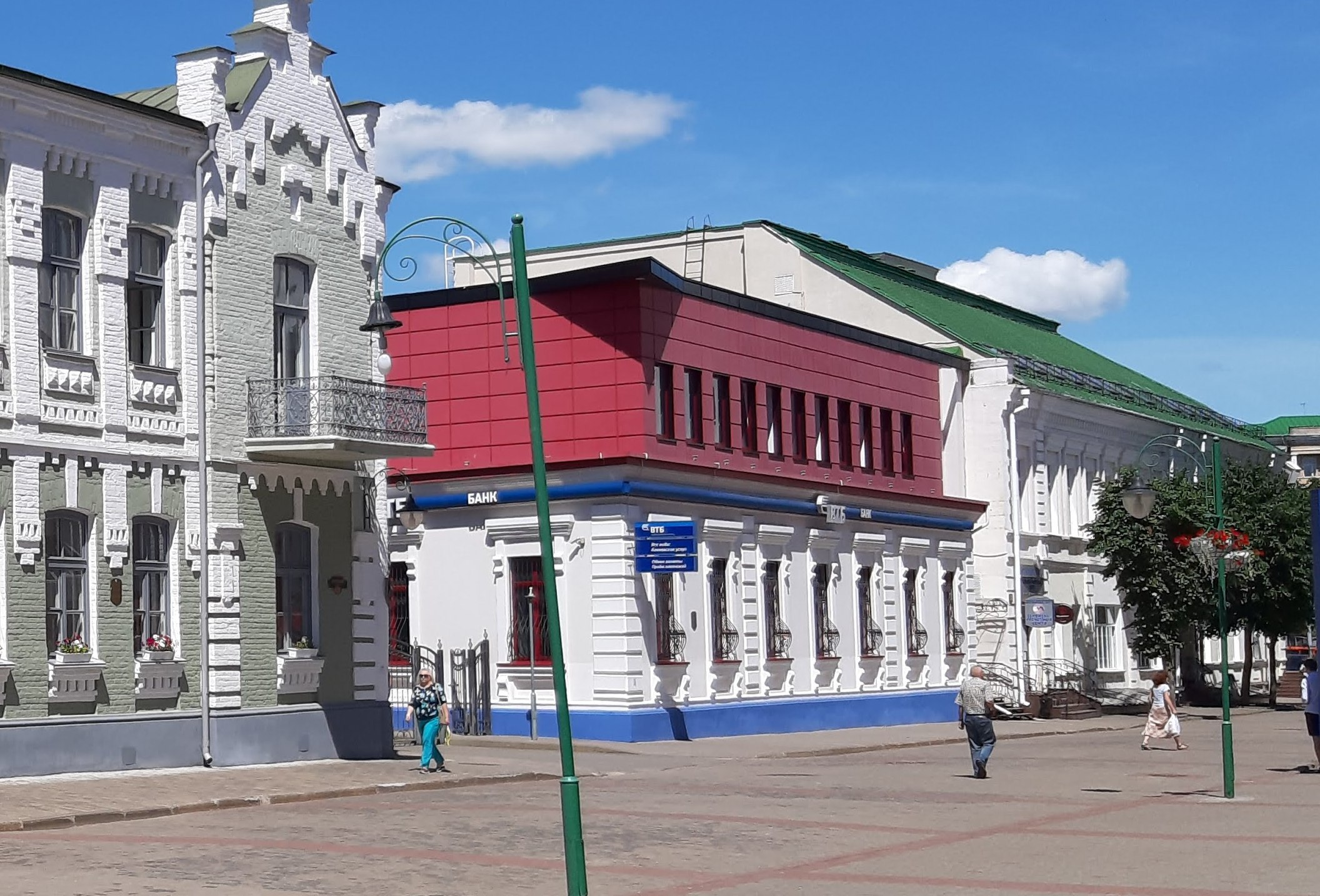 Магілёў. Каля Нацбанка і музшколы